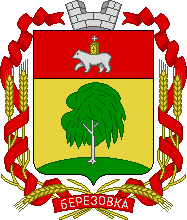 Герб Березовского района Пермской области